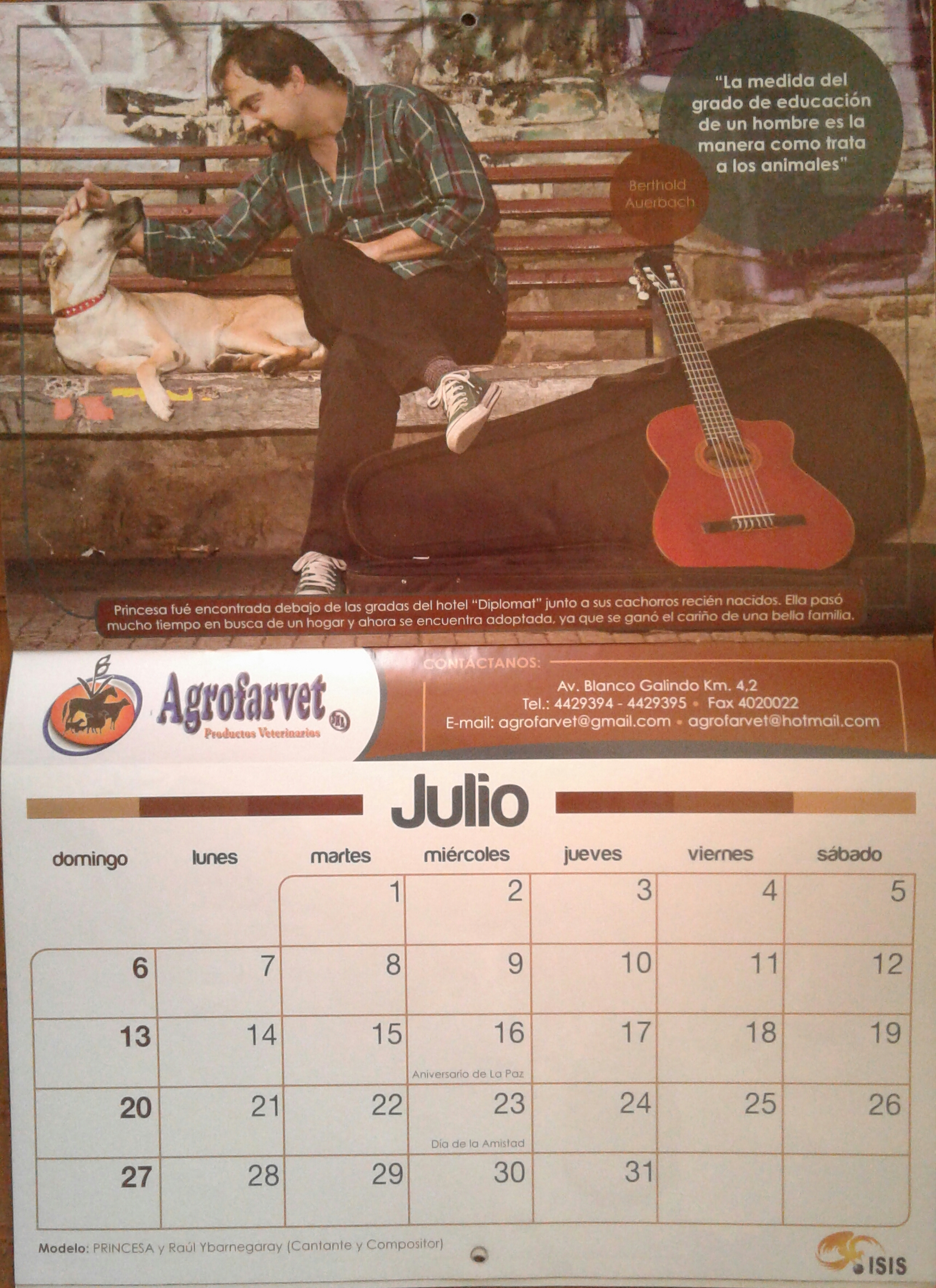 Calendario Fundación ISIS - Conciencia y Respeto Animal y Ambiental (2014)